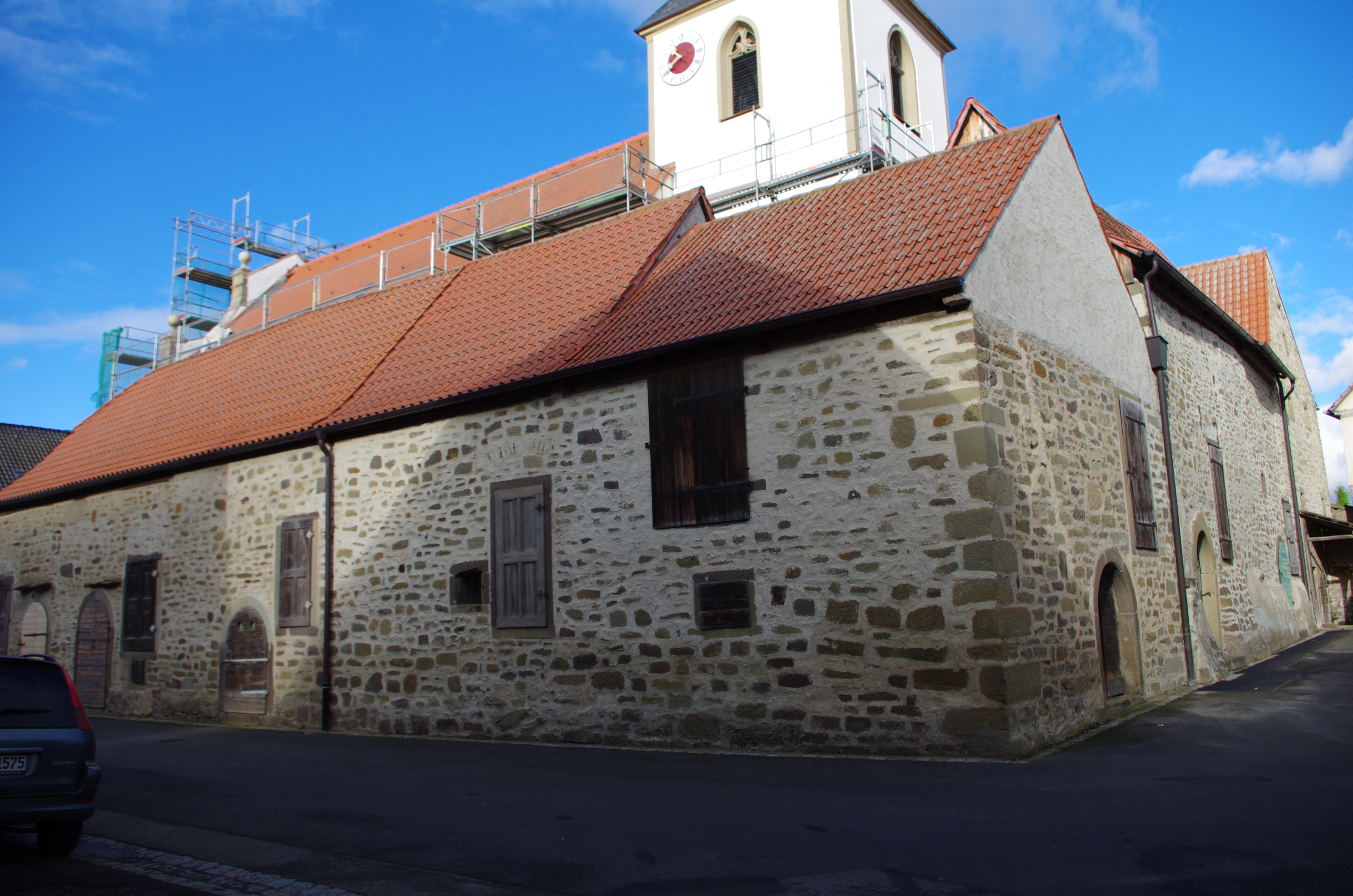 zweigeschossige Massivbauten, teilweise mit Fachwerkoberstock und Satteldächern, im Kern teilweise 16. Jahrhundert, maßgebliche Um- und Neubauten im 17./ 18. Jahrhundert, bezeichnet 1728 und 1787